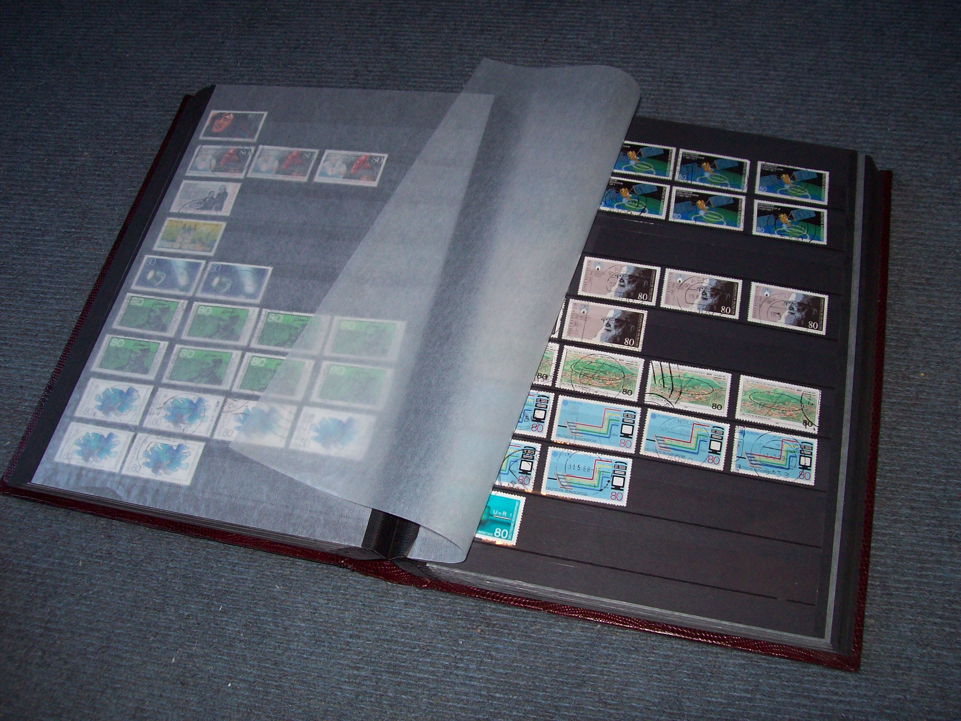 Befülltes Einsteckalbum für Briefmarken